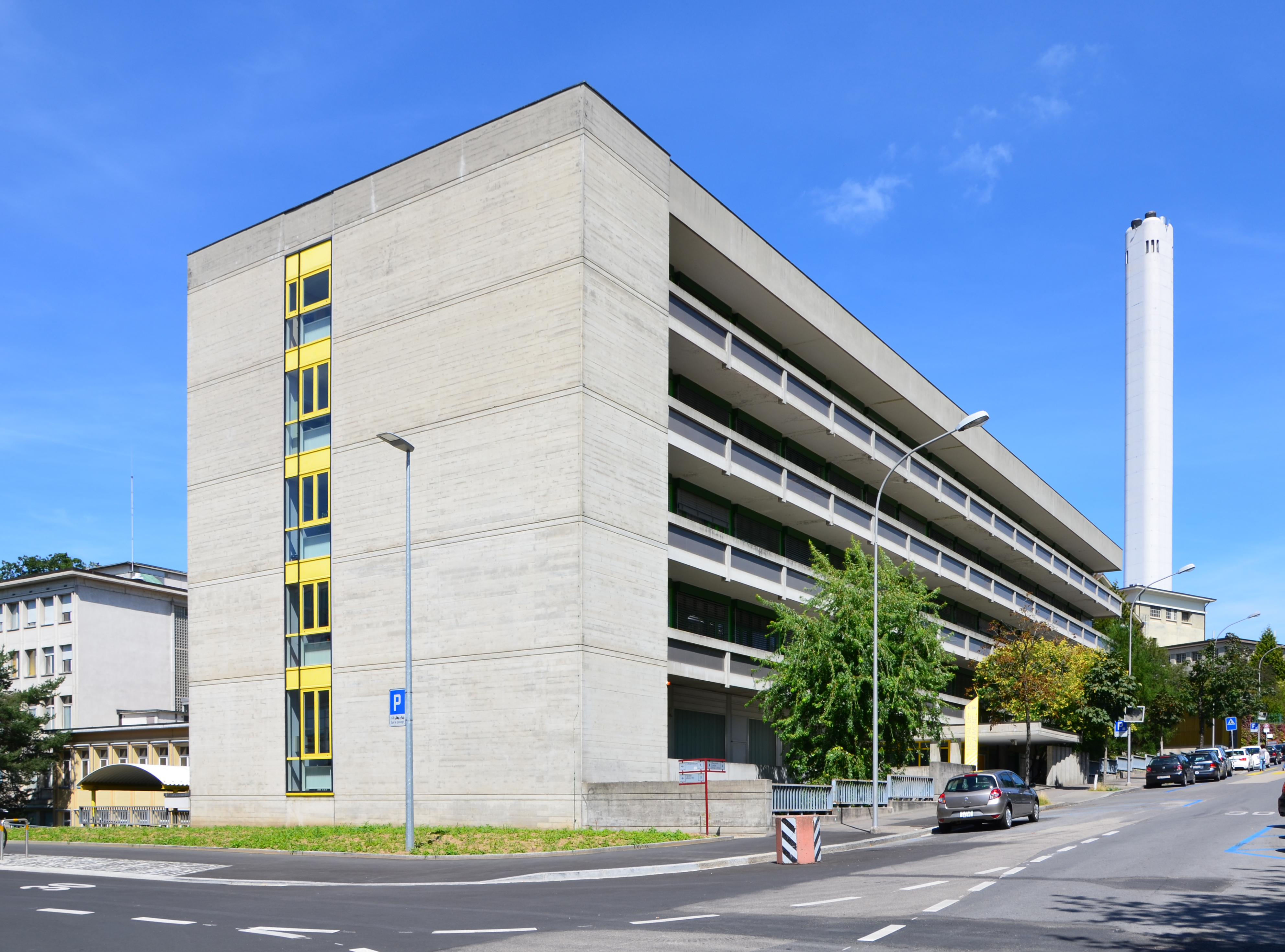 Bâtiment du service de dermatologie-vénérologie du Centre Hospitalier Universitaire Vaudois (CHUV) (Lausanne, Suisse)